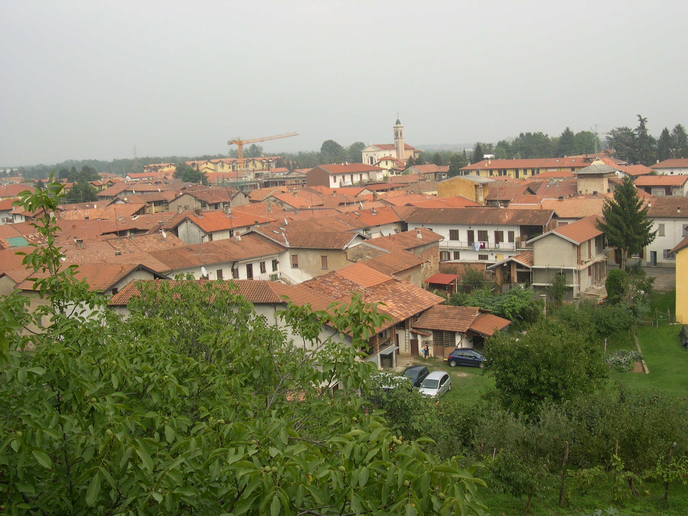 Vista di Bolladello di Cairate (VA). Foto di Niccolò Luoni - 16.09.06.